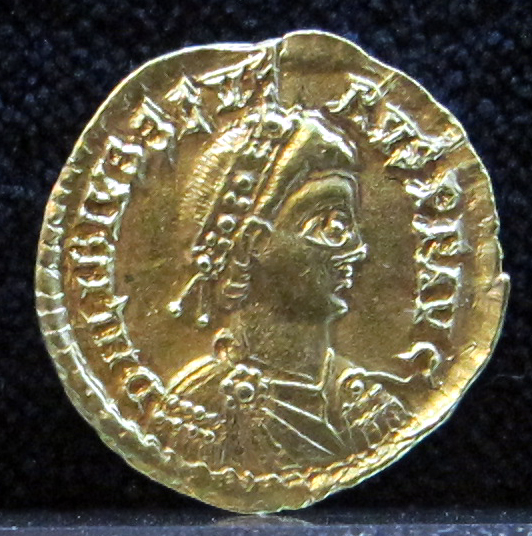 Tesoretto di Sovana, solidi d'oro, V secolo